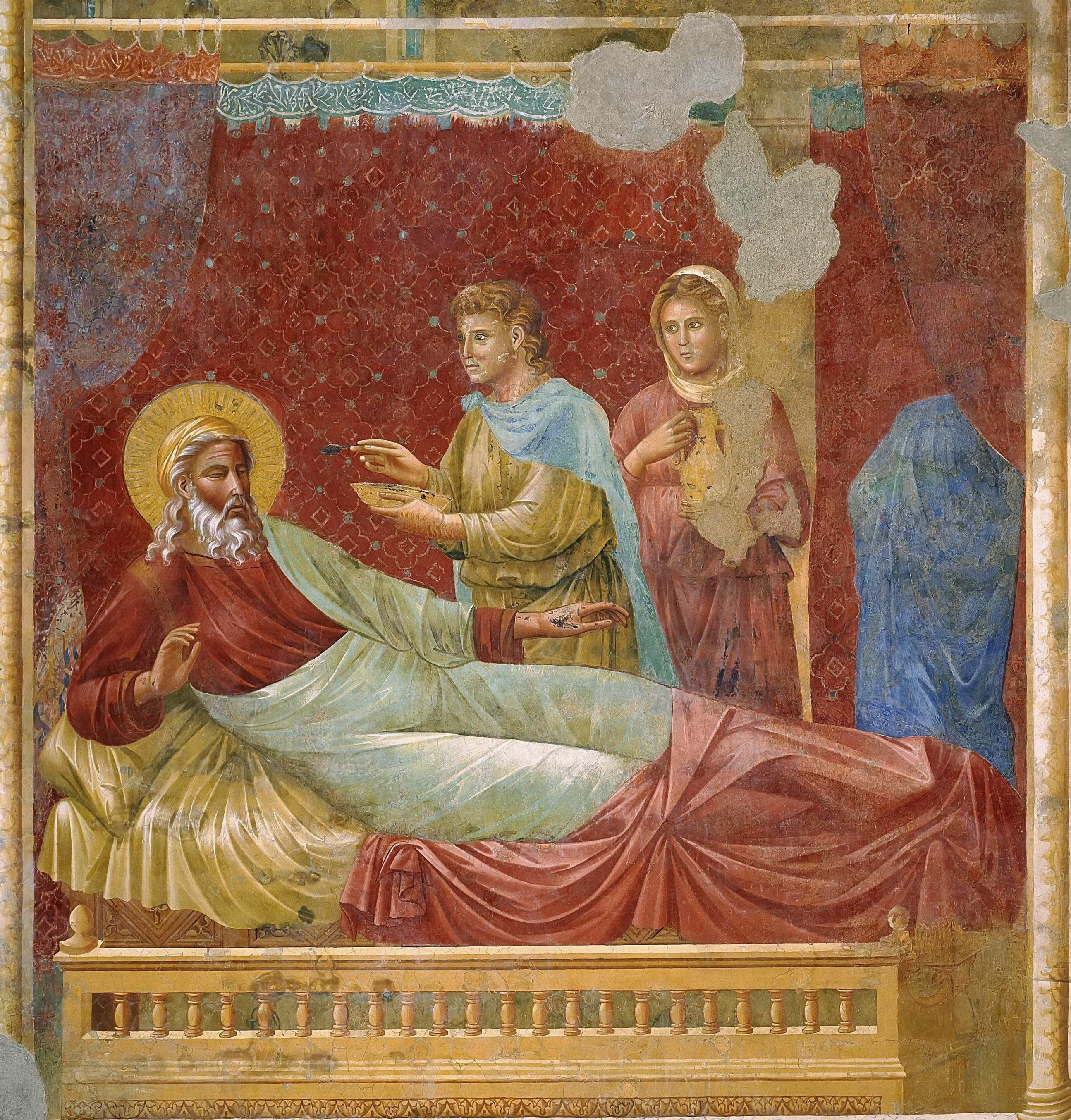 Freskenzyklus zum Leben des Hl. Franziskus von Assisi